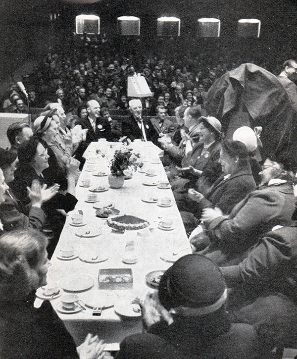 Frukostklubben. Radiostudion Karlaplan